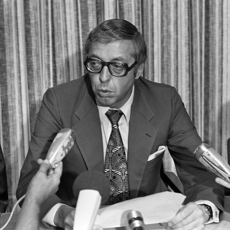 Jacques Hogewoning tijdens persconferentie.